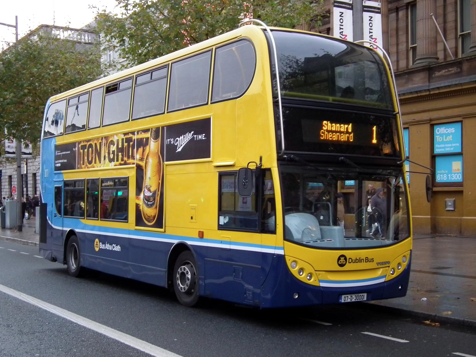 Dublin Bus, Volvo B9TL Alexander Dennis Enviro400 (07-D-30001)